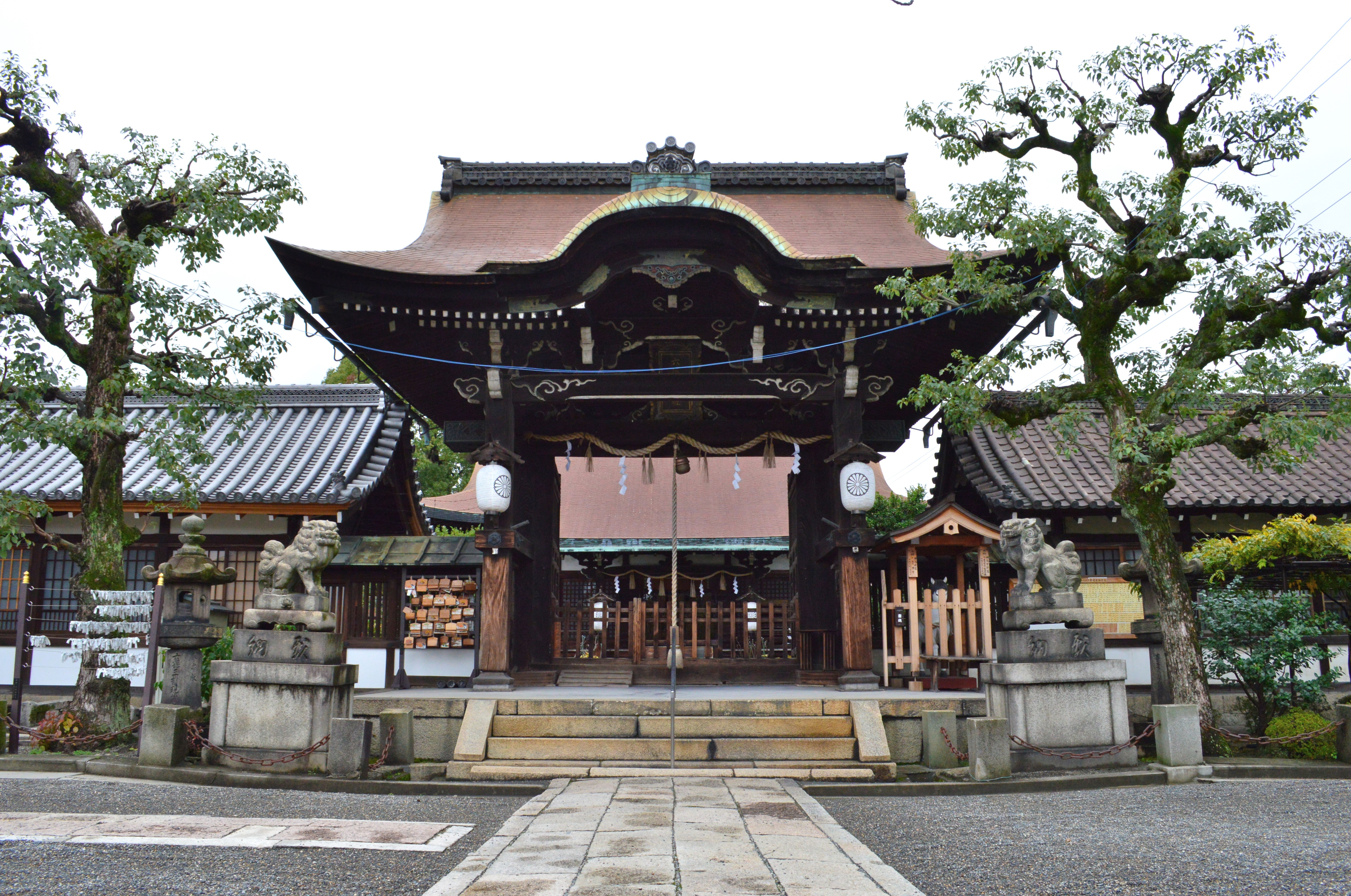 六孫王神社 神門